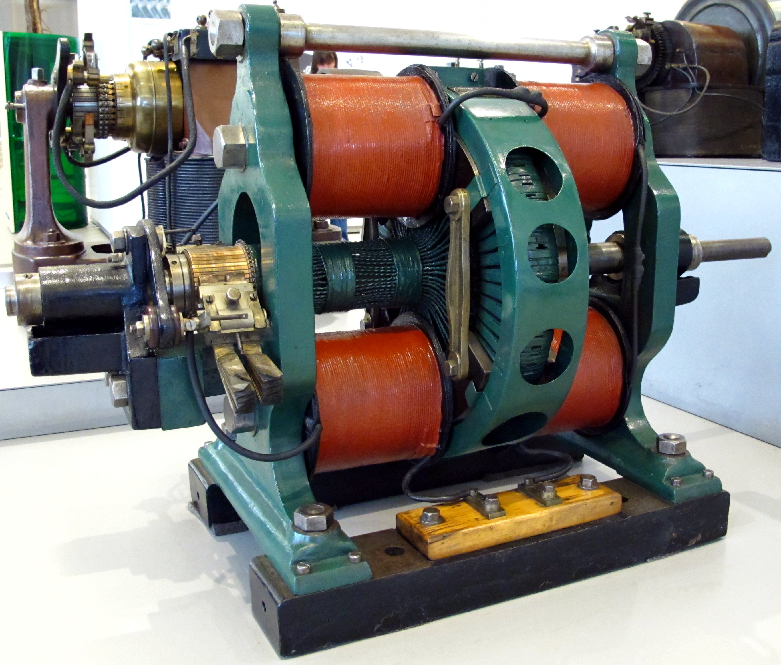 Schuckertsche FlachringmaschineSchuckerts Konstruktion weist - anders als der Gramme-Motor - einen Flachringläufer auf. Der Kommutator befindet sich außerhalb des magnetischen Kreises. Hersteller: Siemens & Schuckert Baujahr:1883